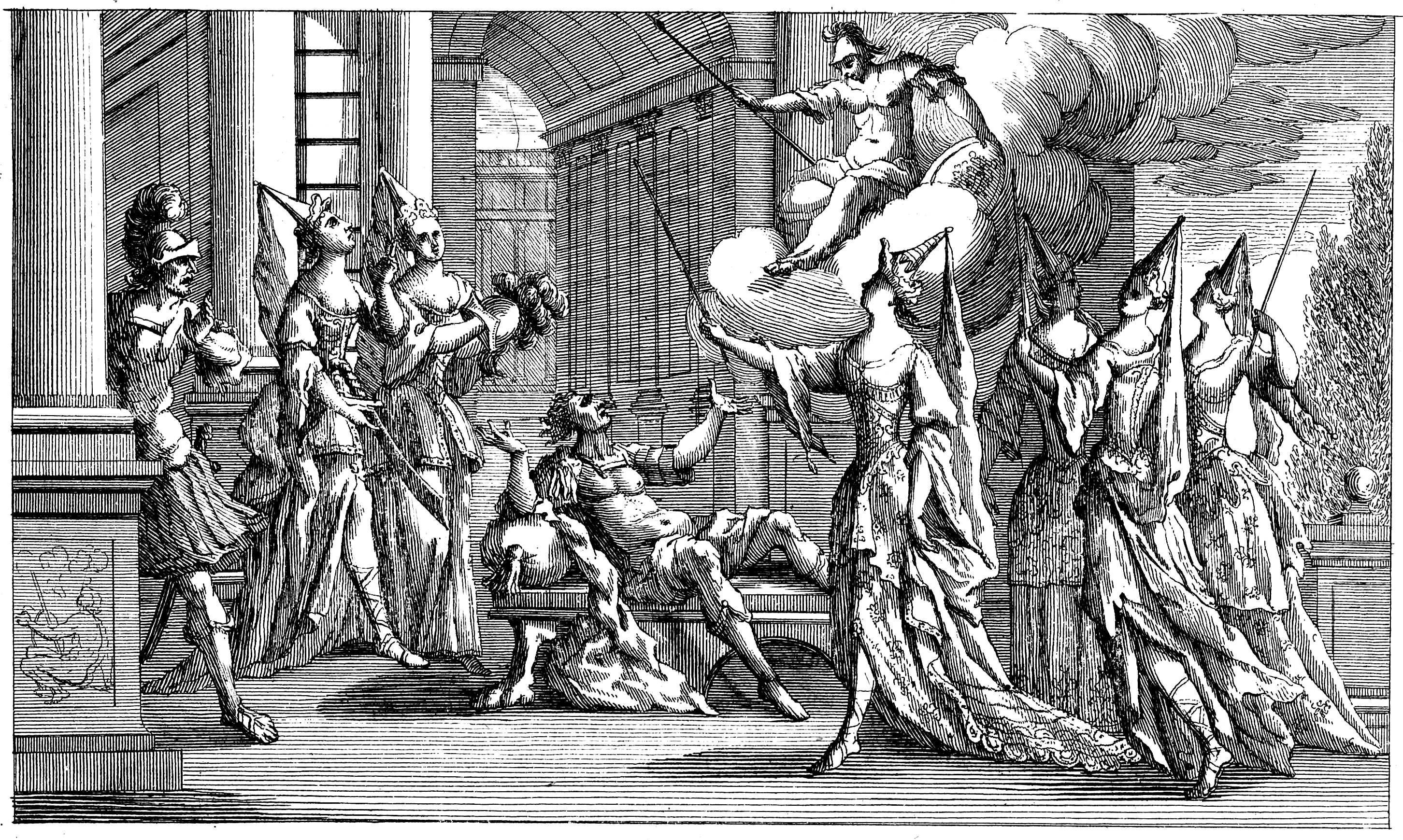 Jean-Baptiste Lully - Roland - Acte 5 - Le Palais de la sage Fée Logistile - Paris 1685